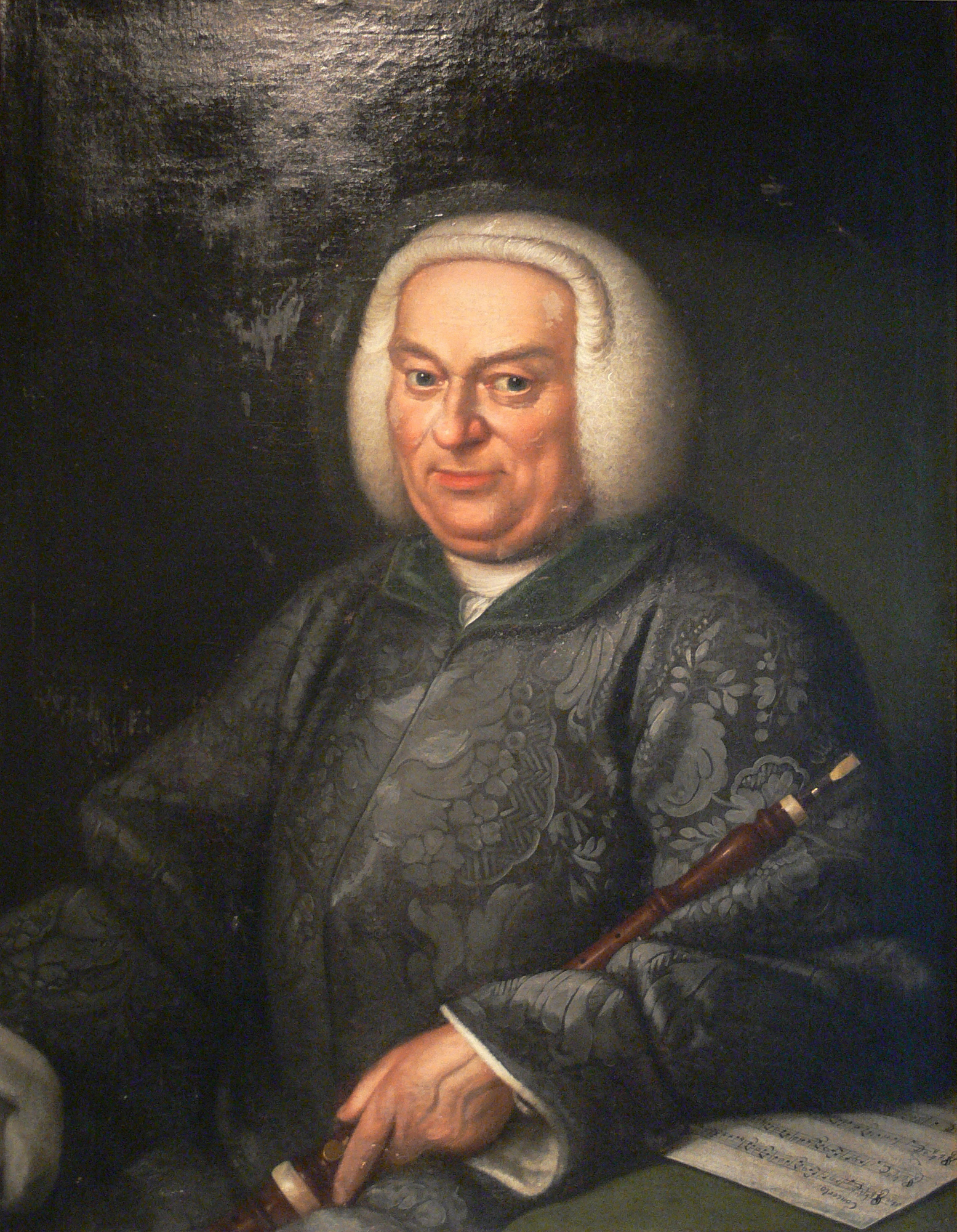 Portrait eines unbekannten Oboisten, unsigniert Musikinstrumentenmuseum Berlin, Inv. Nr. Or 2 + J a/R6